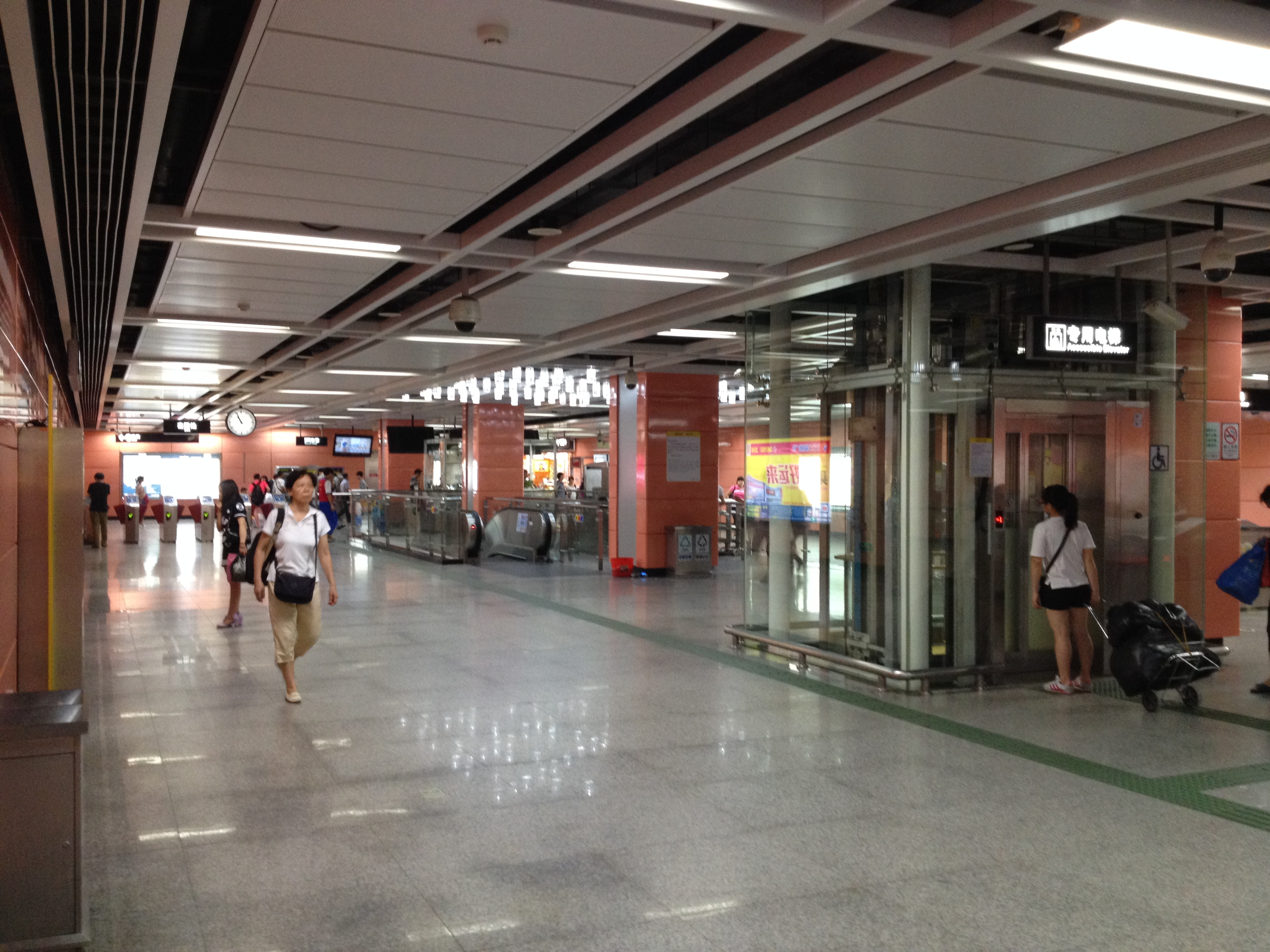 广州地铁同和站站厅